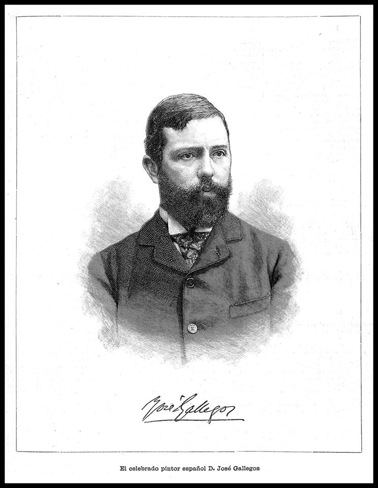 Pintor español